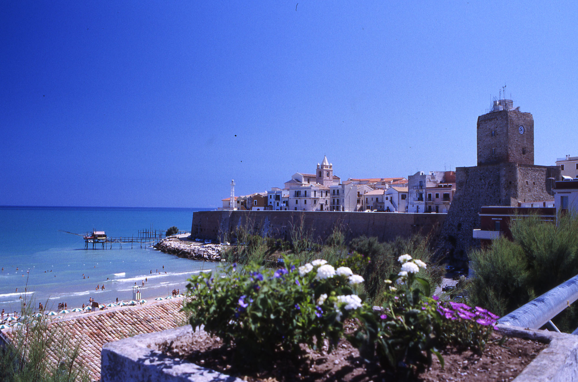 Vista del Borgo Antico